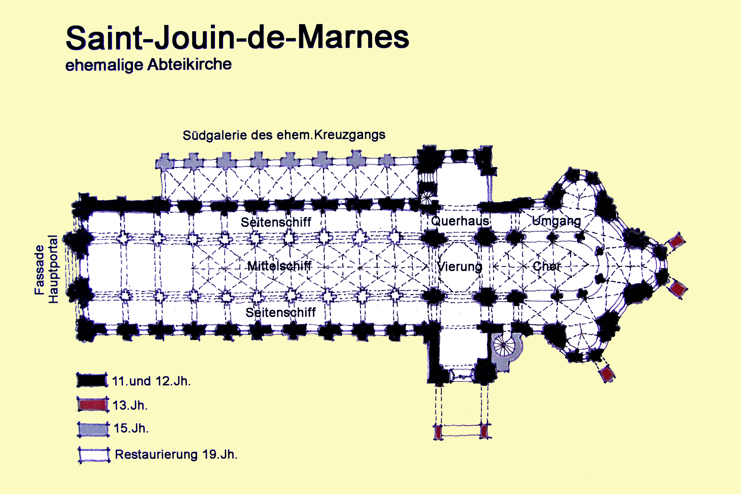 Saint-Jouin-de-Marnes, Grundriss, Handskizze